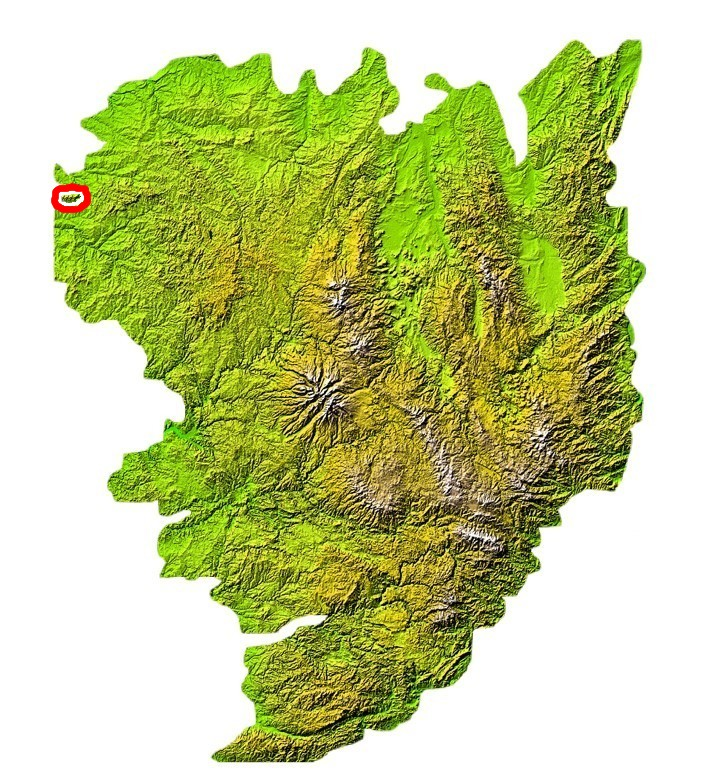 Situation des Monts de blond sur la carte du Massif central